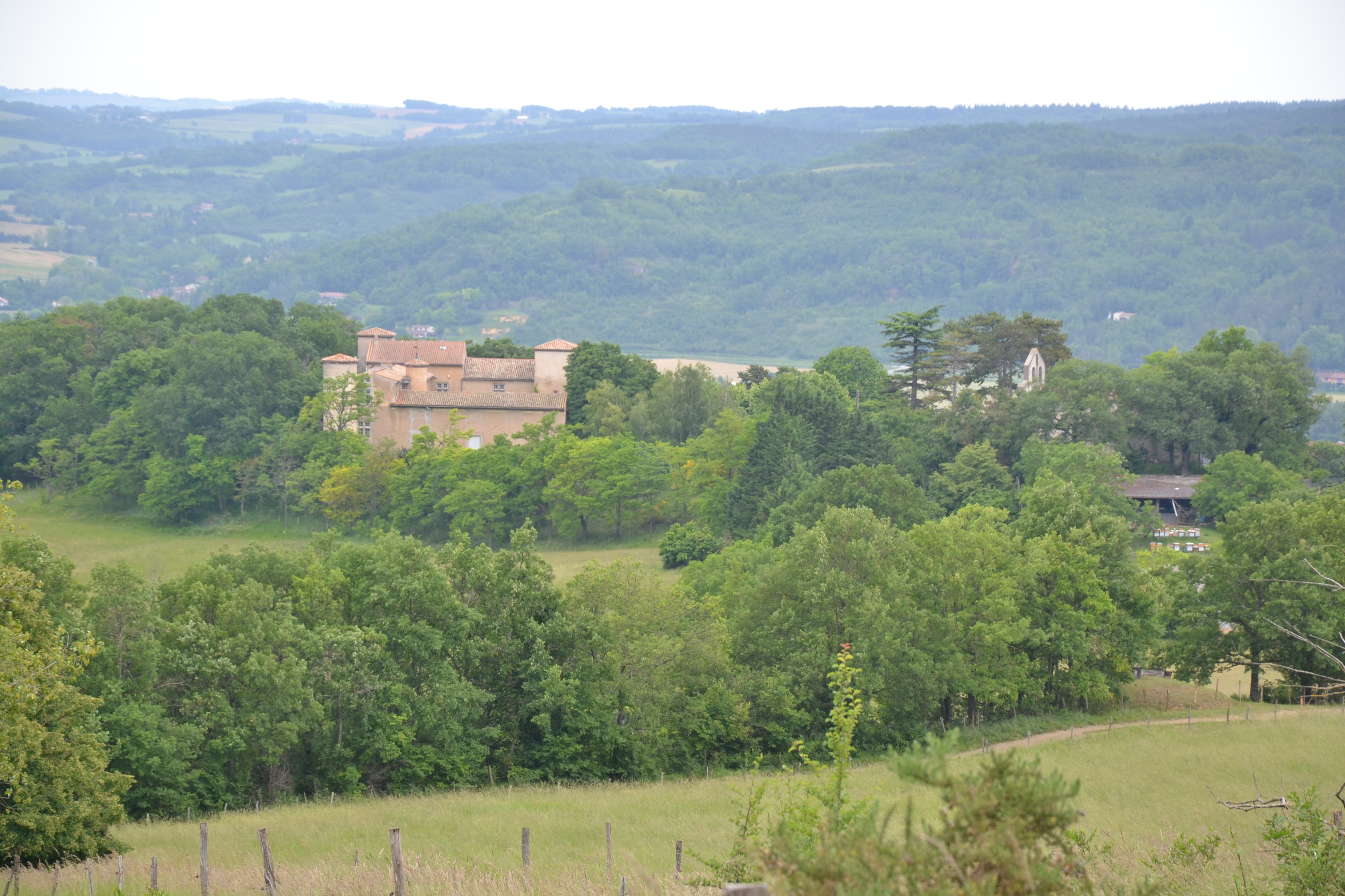 Le château de Gargas, à Viviès (Ariège, France).